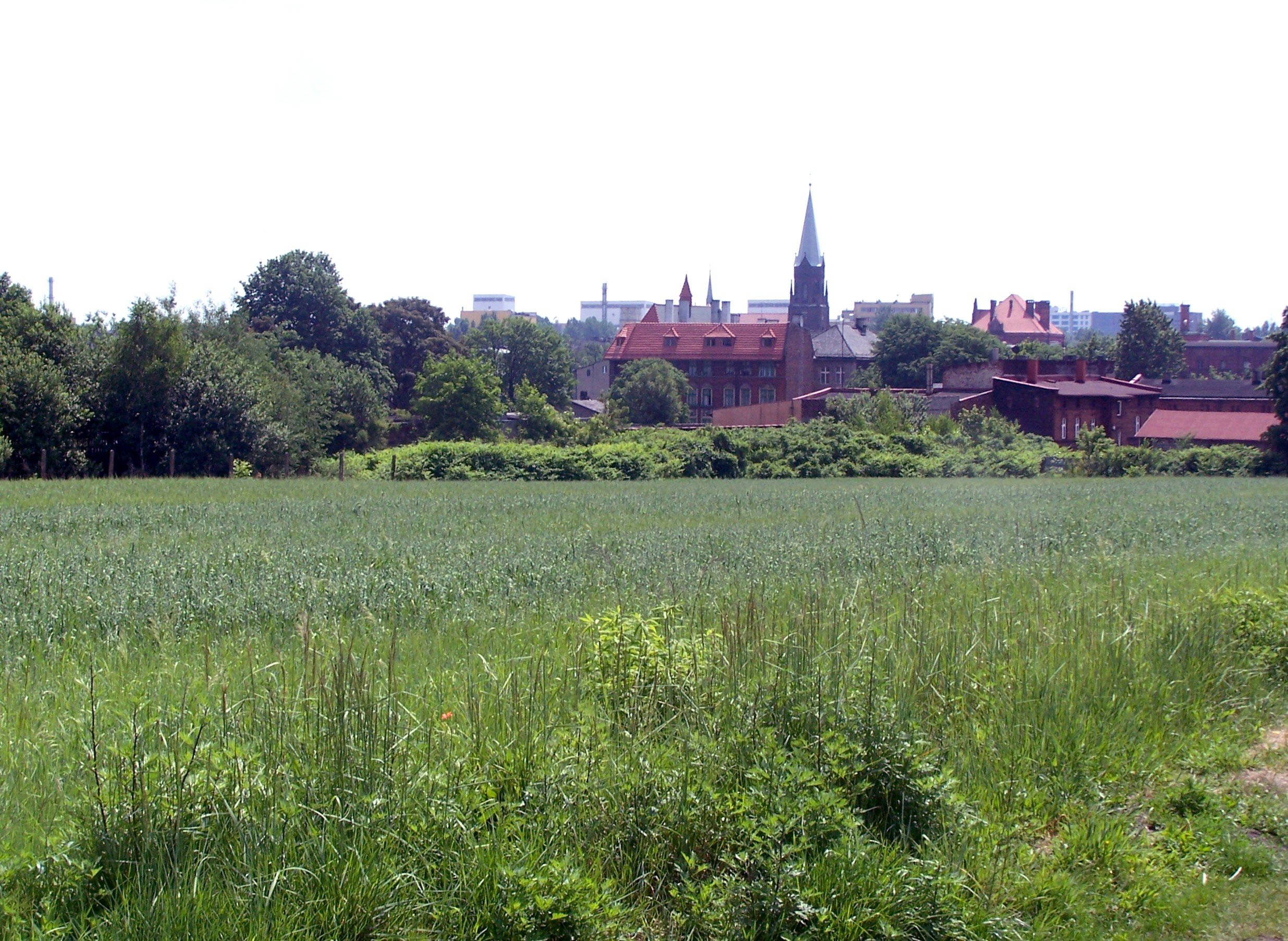 Szopienice.